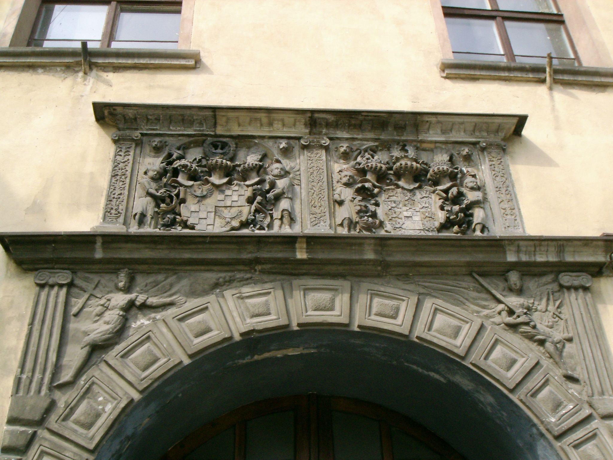 Brzeg